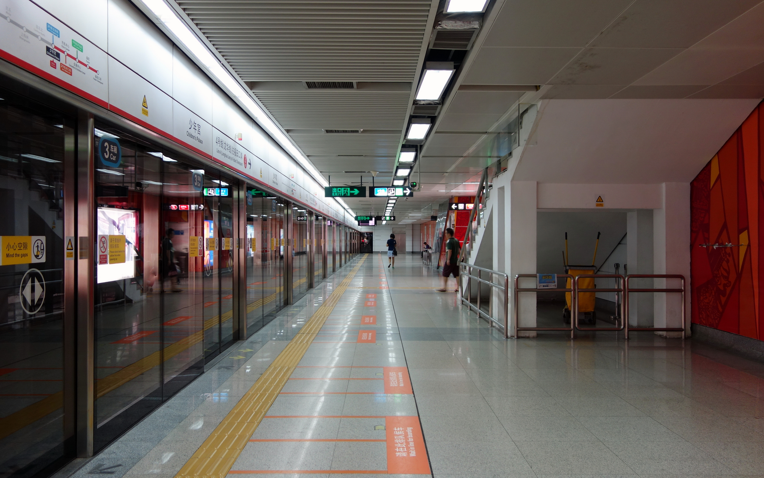 深圳地铁龍華線（4号綫）少年宮站往福田口岸方向的側式月台